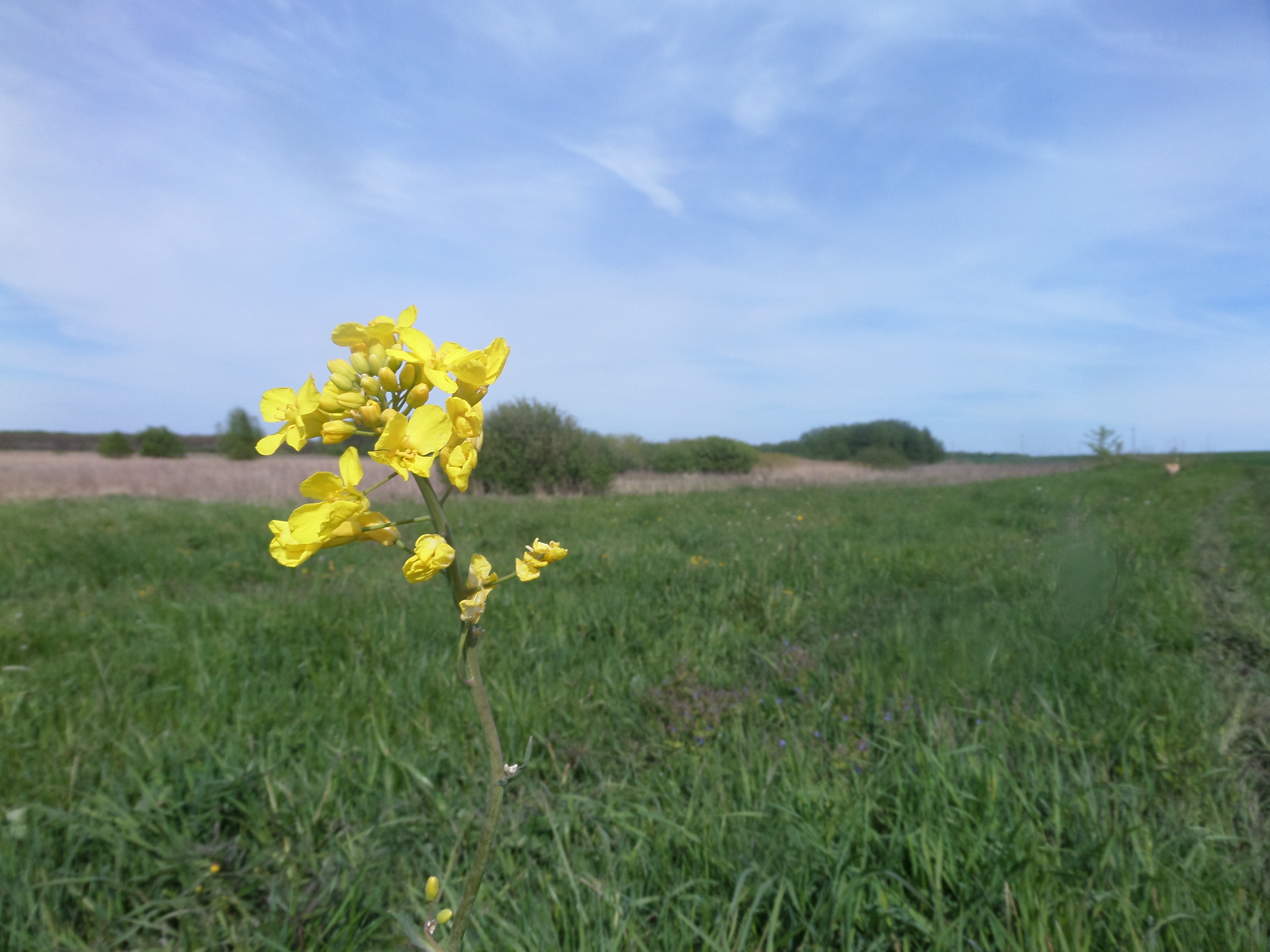 Сумська область, Великописарівський район, околиця села Ямне